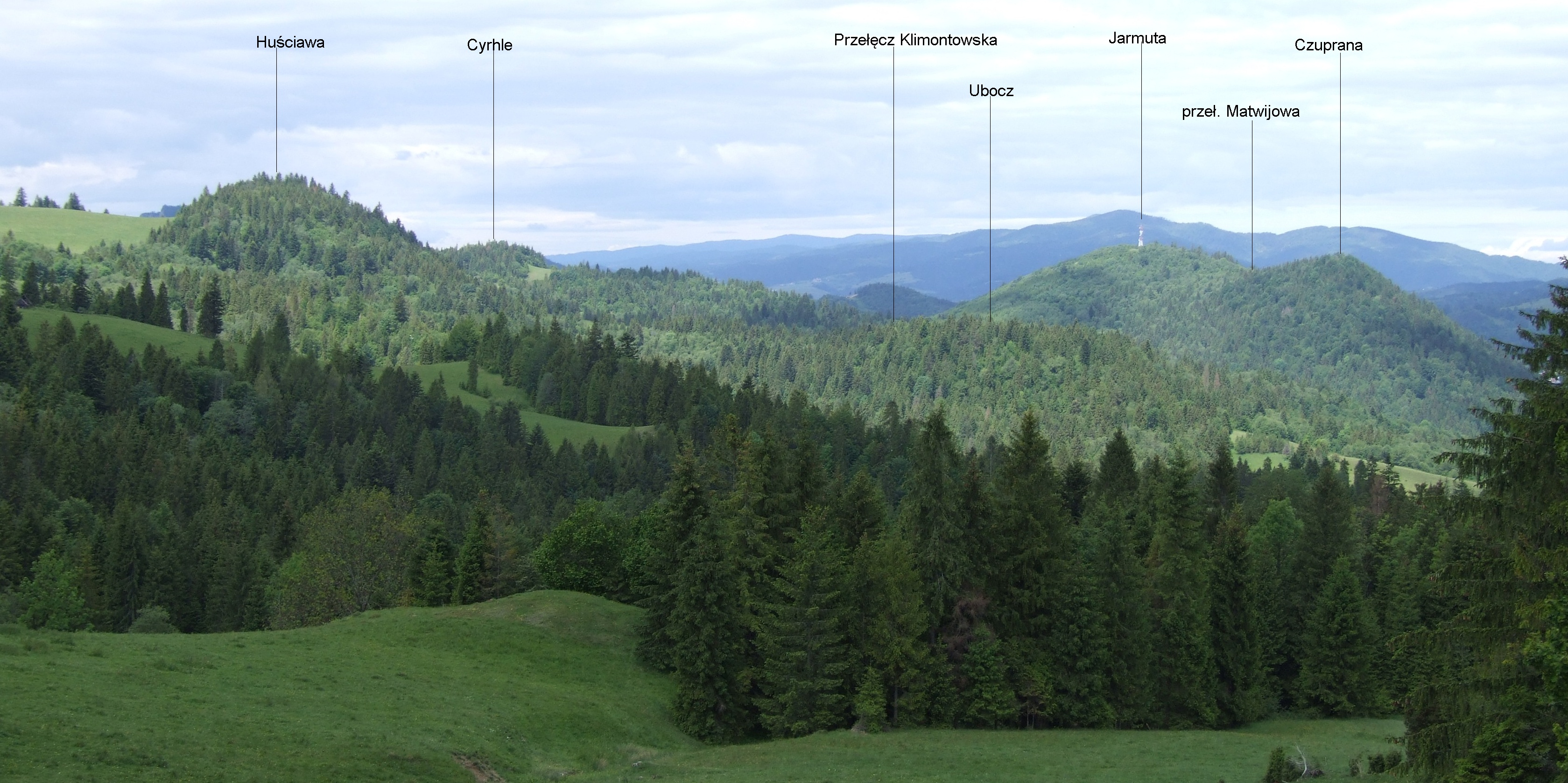 Widok od wschodniej strony, ze szlaku do schroniska pod Durbaszką